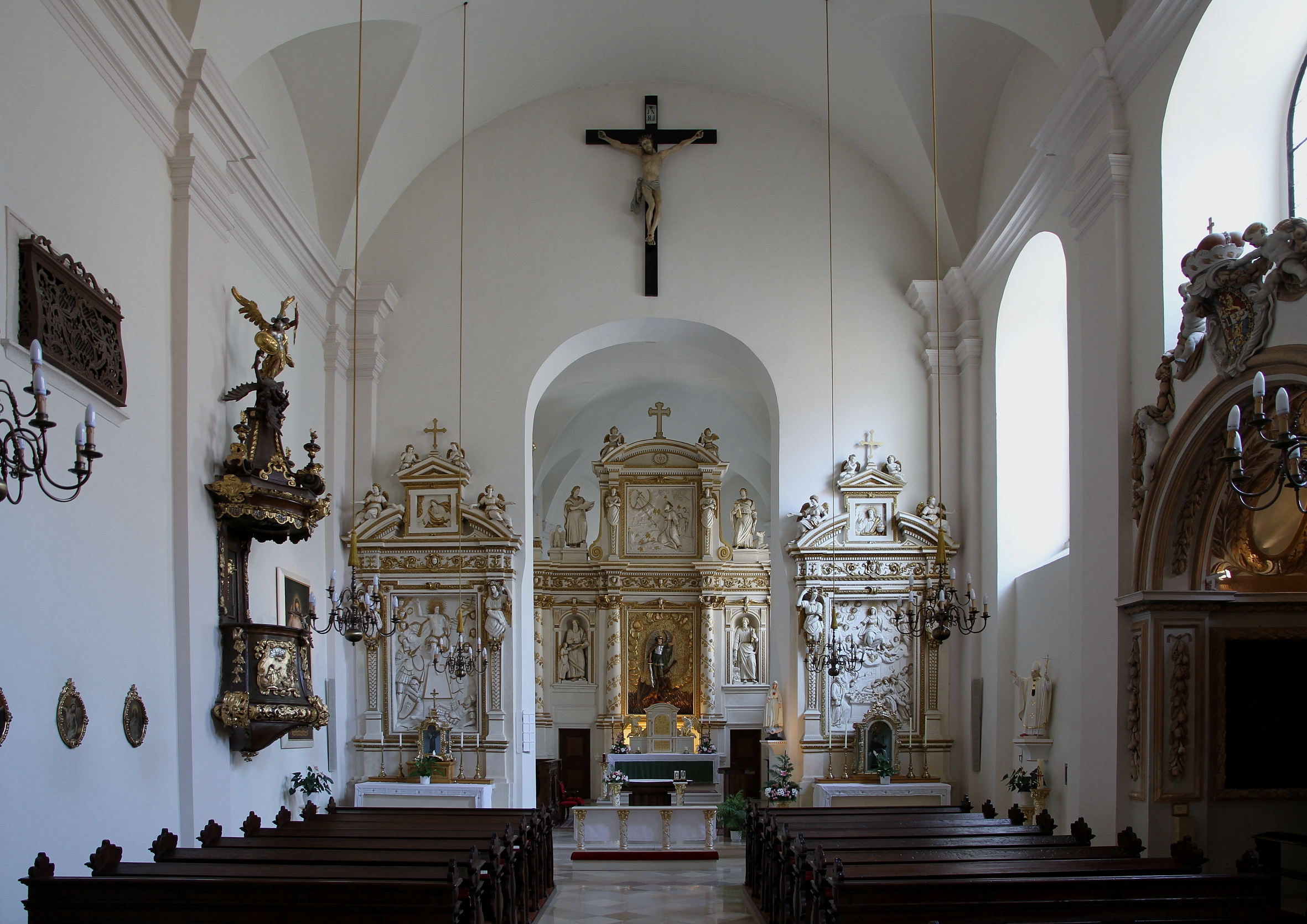 Innenansicht der Franziskanerkirche hl. Michael in der burgenländischen Stadt Eisenstadt.